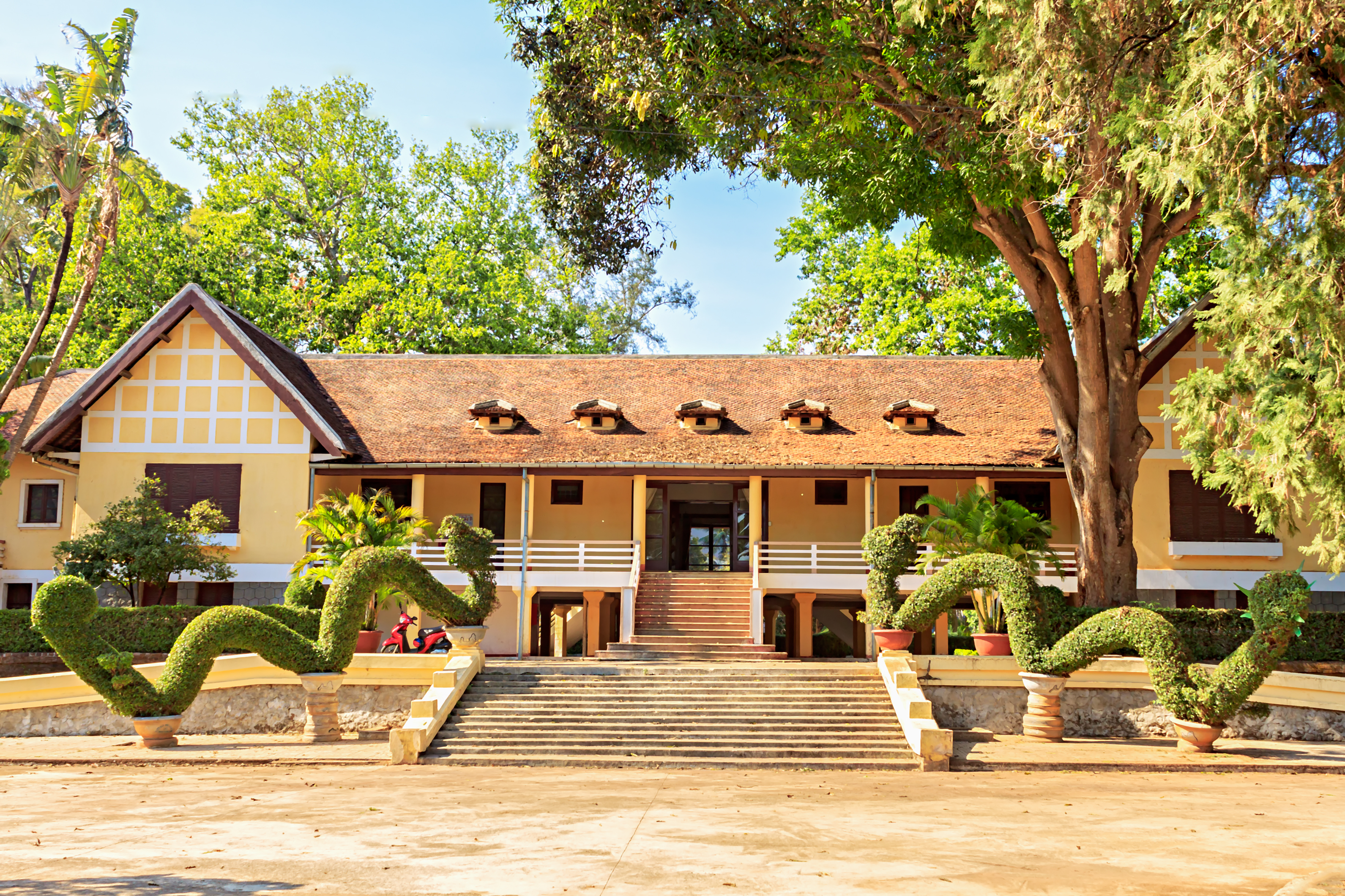 Biệt Điện Bảo Đại ở TP Ban Ma Thuột, Việt Nam.